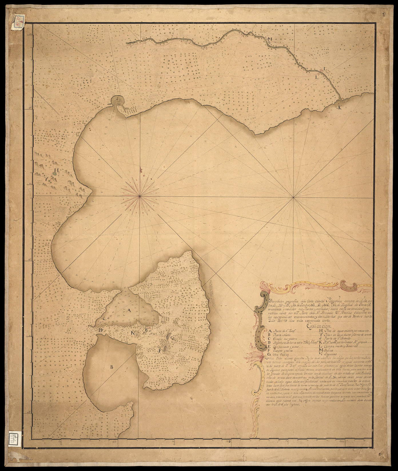 Mapa de las exploraciones de 1779 elaborado por Basilio Villarino. A. Puerto de San José. B. Puerto Nuevo. C. El mayor surgidero. D. Angostura de tierra entre Puerto Nuevo y San José. E. Campamento y pozos. F. Fuentes y salina. G. Otra salina. H. Pozo de agua salobre permanente. Y. Pozos de agua dulce y cerros de arena. J. Puerto de San Antonio. K. Río Negro nombrado por los indios Río Grande. L. Campamento y tolderías. M. Salina. N. Lagunas.